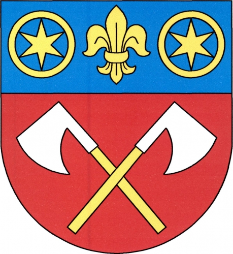 znak, Skočice, okres Strakonice